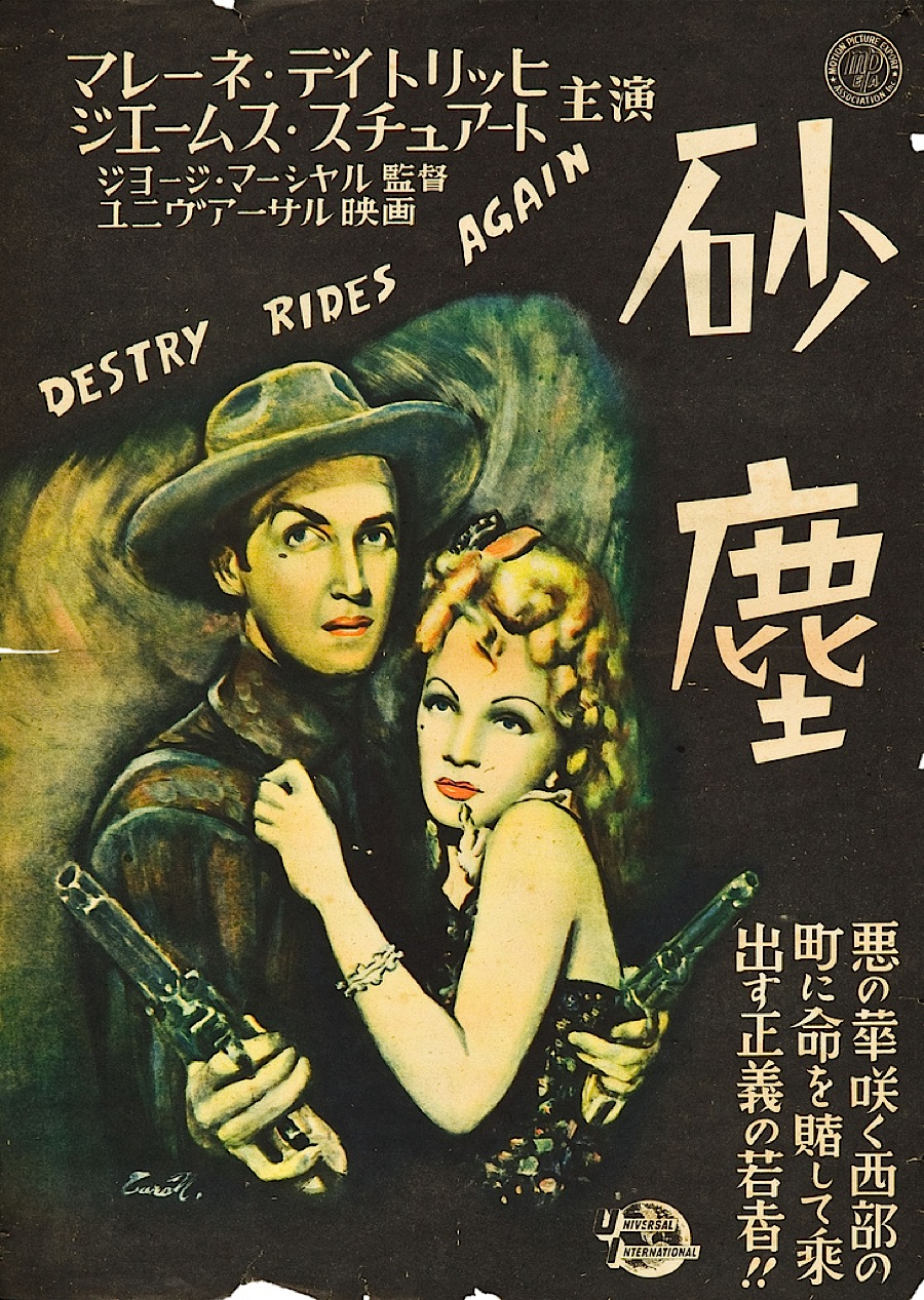 砂塵』（さじん、原題：Destry Rides Again）は、1939年に製作・公開されたアメリカ合衆国の映画である。